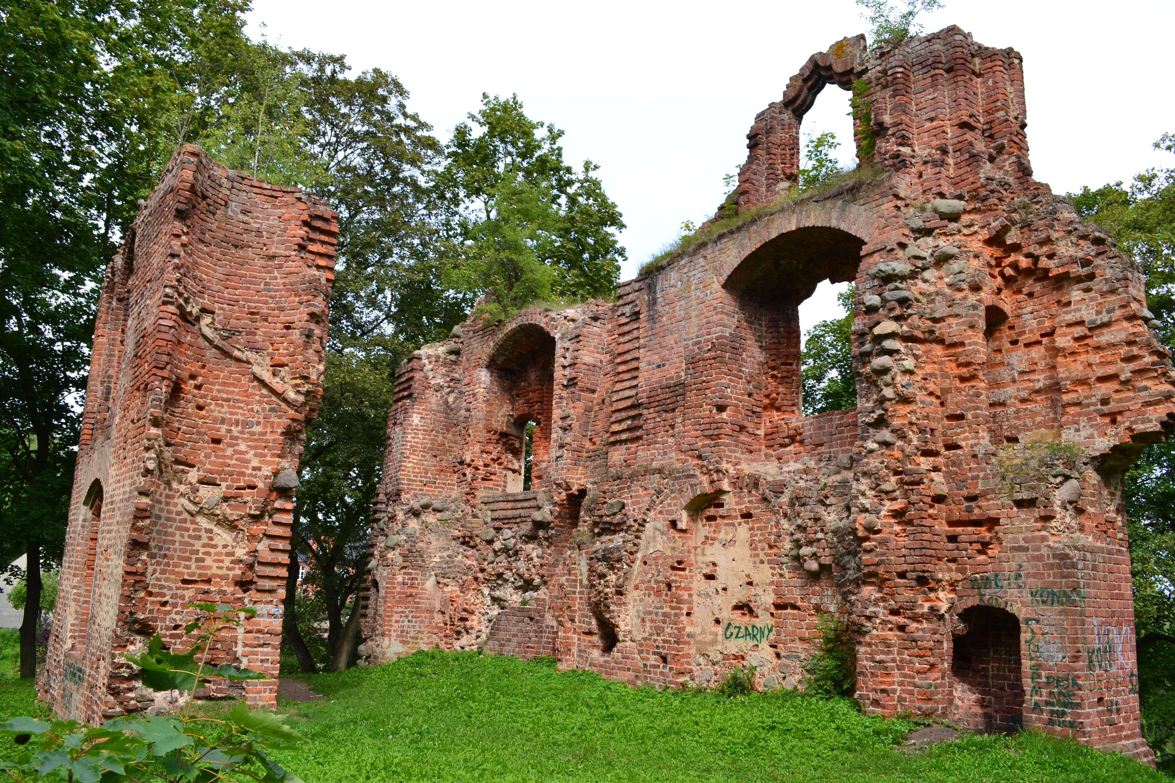 Ruiny zamku w Dobrej Nowogardzkiej